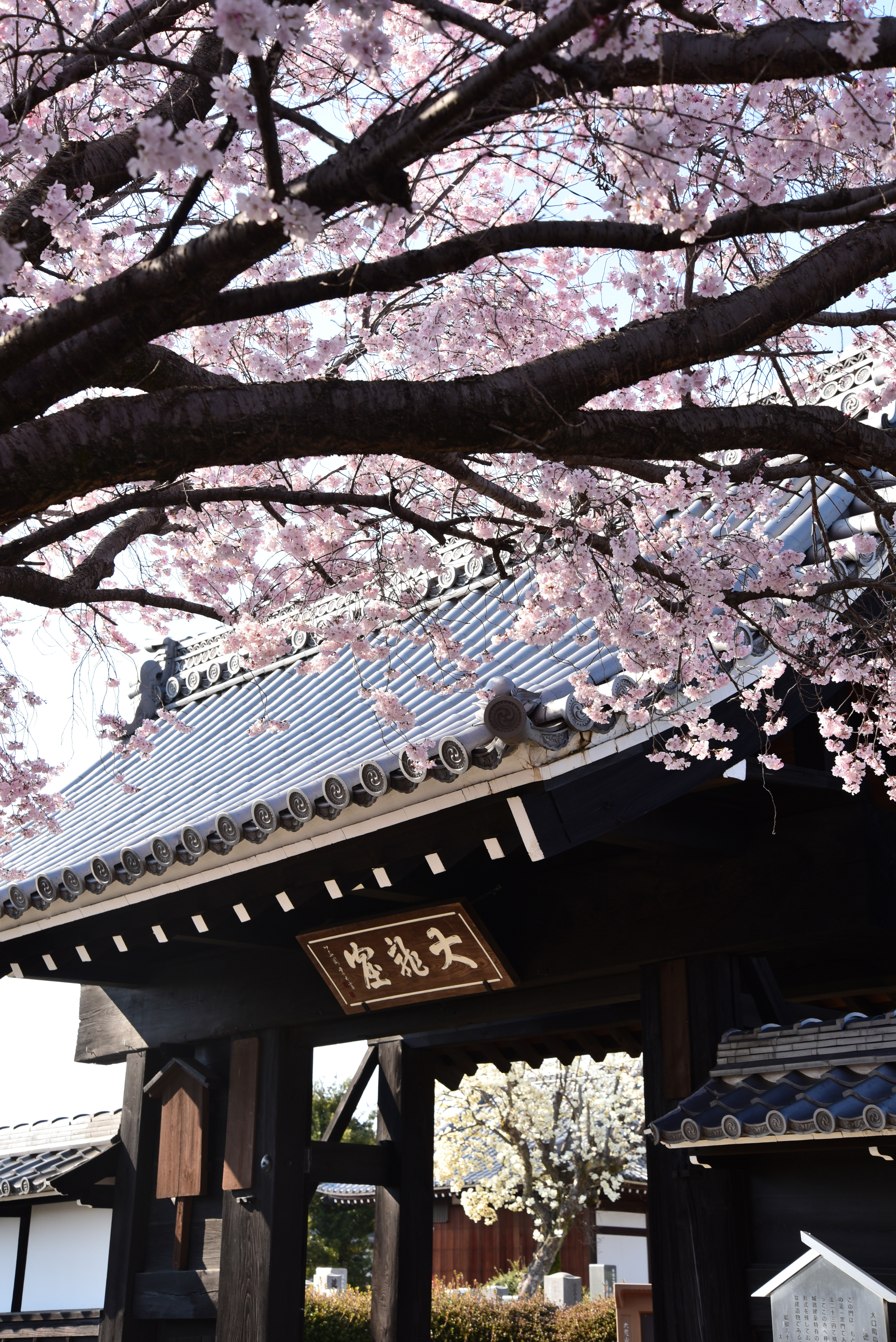 徳林寺山門